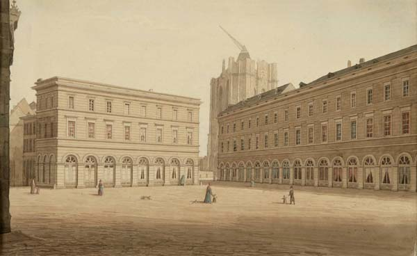 Johann-Peter Weyer: Wallraf-Platz in Köln (Aquarell)